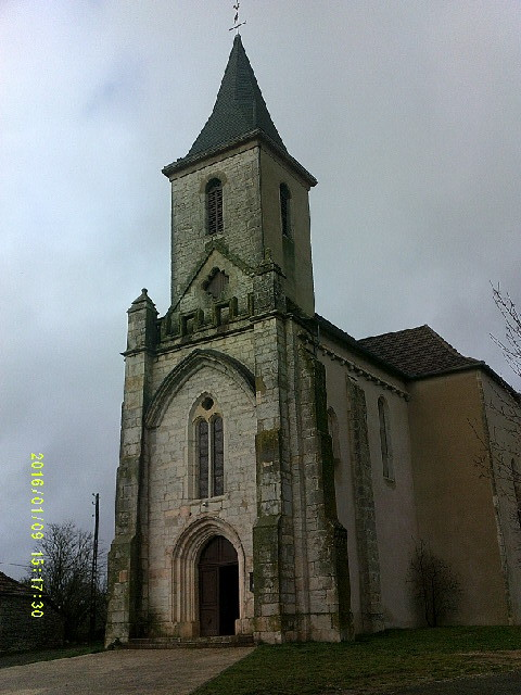 église de Flaujac-Gare (Lot-France).